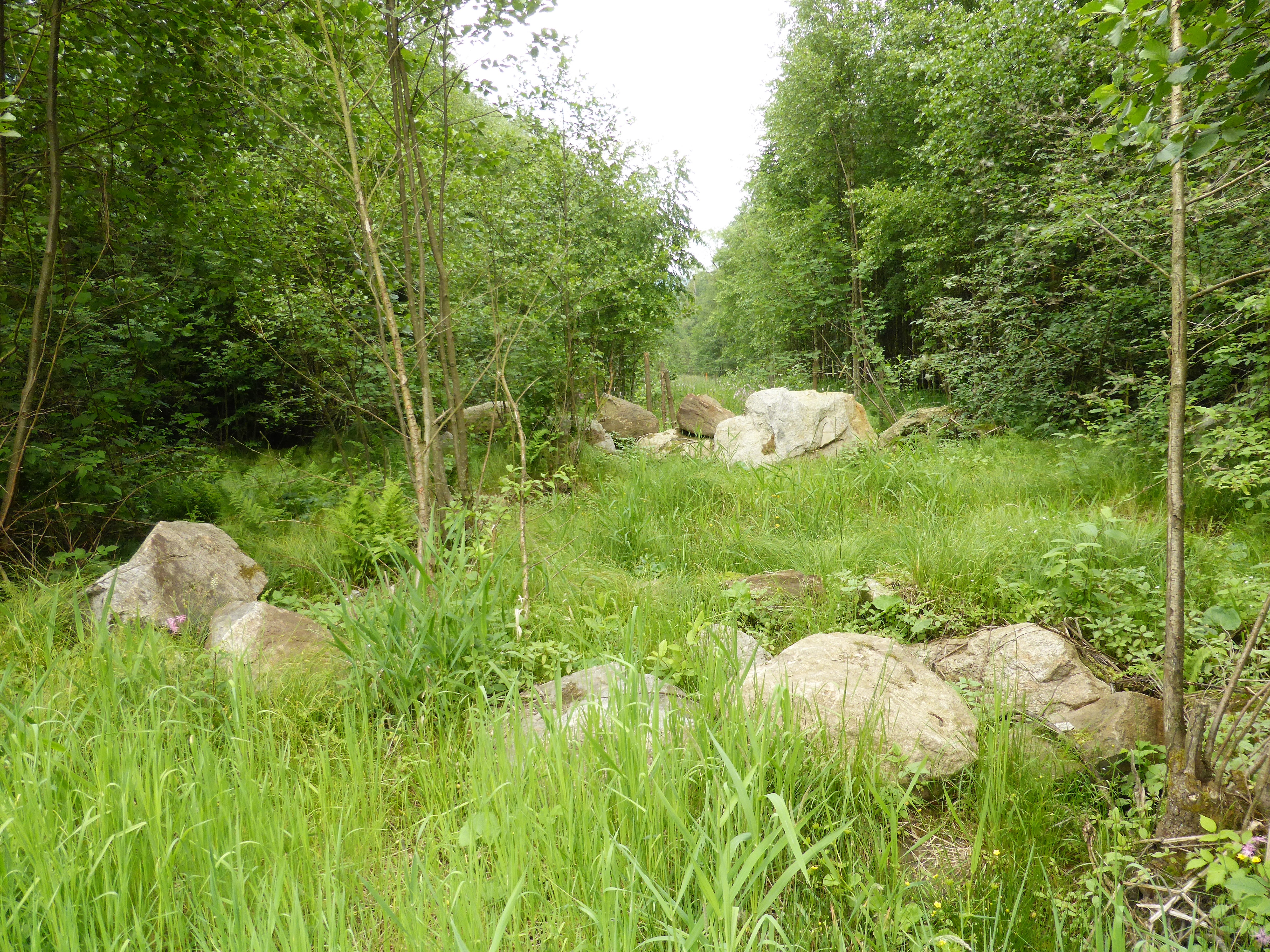 Das Prackenbachtal bei der Ortschaft Fichtental. Markante Steinblöcke liegen in den Wiesen bzw. am Rande des Flußbettes. Geotop mit der Nr. 276R026 im Landkreis Regen.